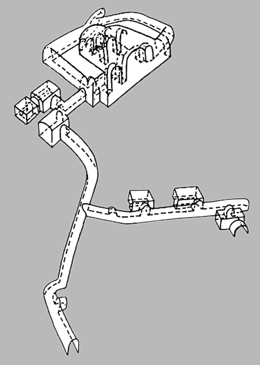 План Холкова подземного монастыря в аксонометрии по В.И. Плужникову